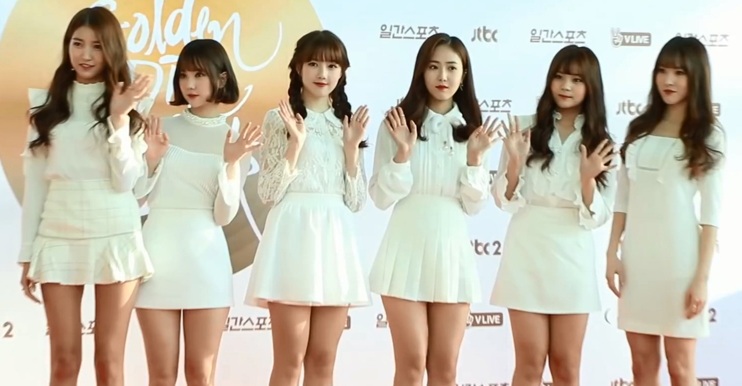 (TV10) 여자친구·트와이스·블랙핑크, 레드카펫 각양각색 패션 열전 (2017 골든디스크 레드카펫)